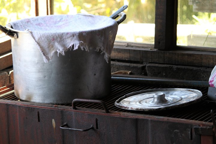 Olla en Fogon